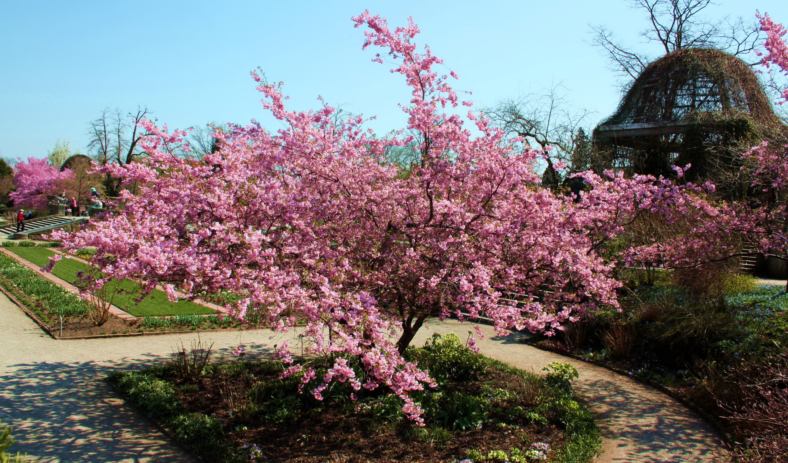 Kirschbaum in Blüte - Prunus sargentii im Botanischen Garten München